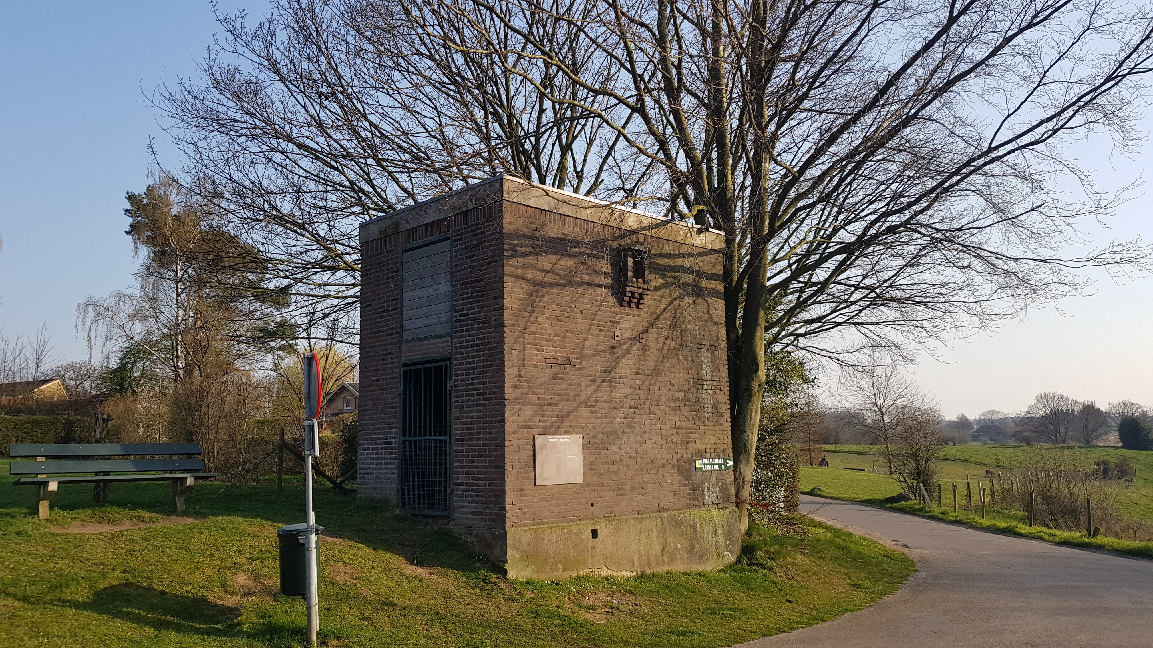 Waterput Landsrade, Limburg, Nederland